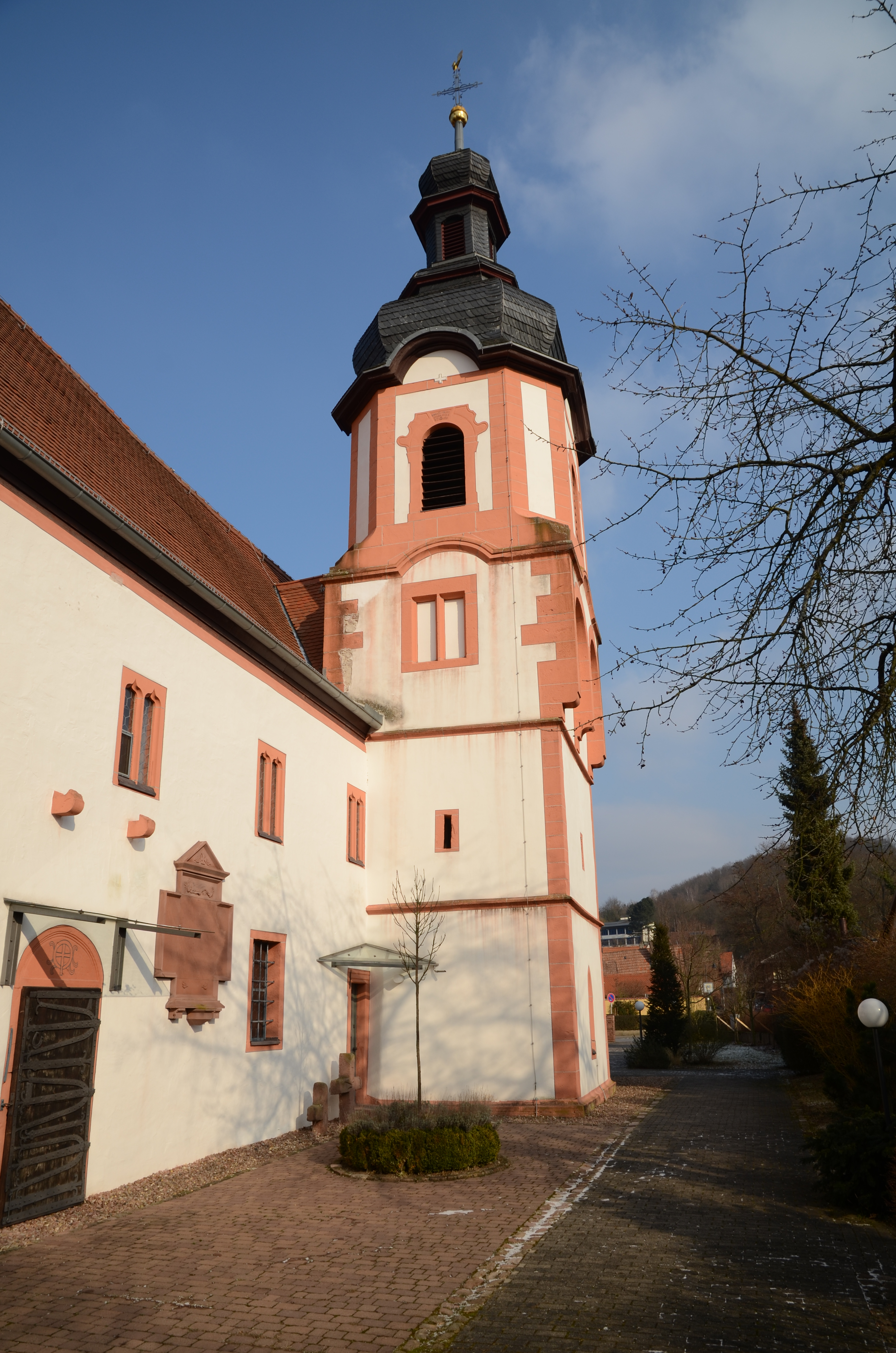 Evangelische Kreuzkirche in Kreuzwertheim